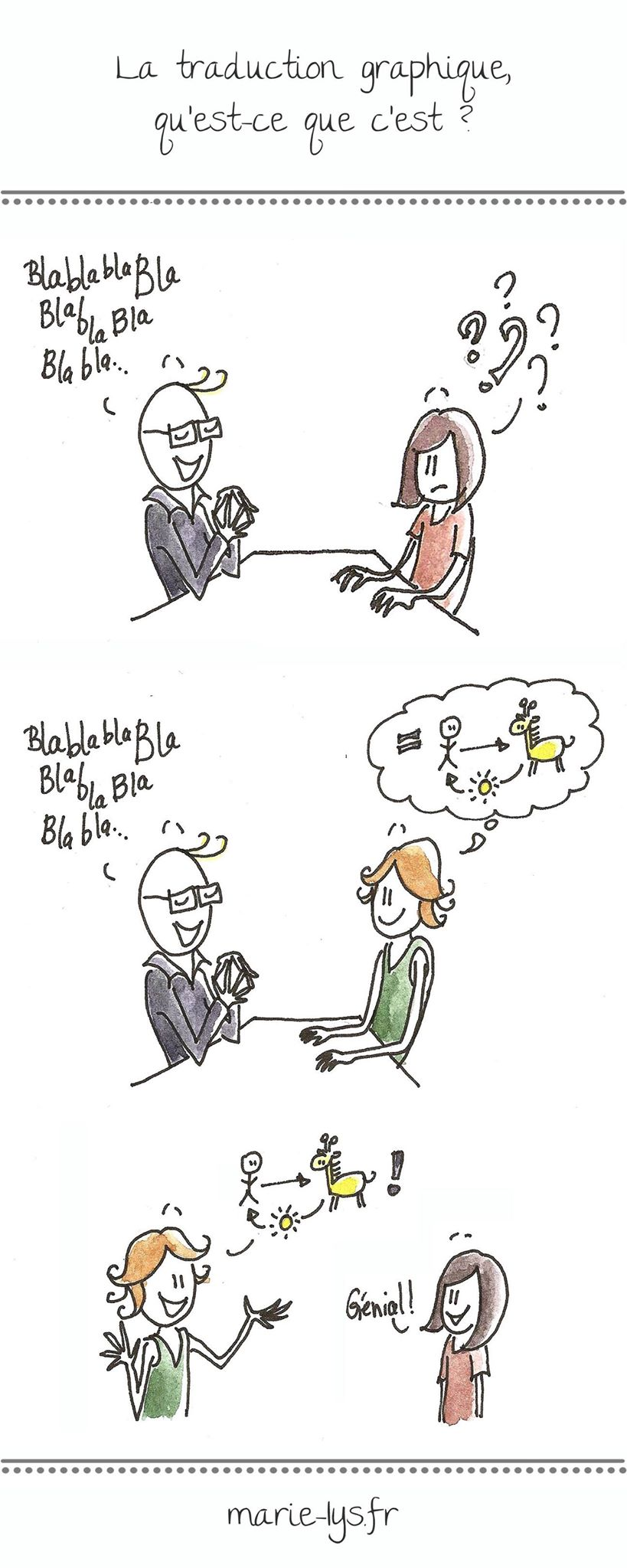 La traduction graphique selon Marie-Lys, traductrice graphique